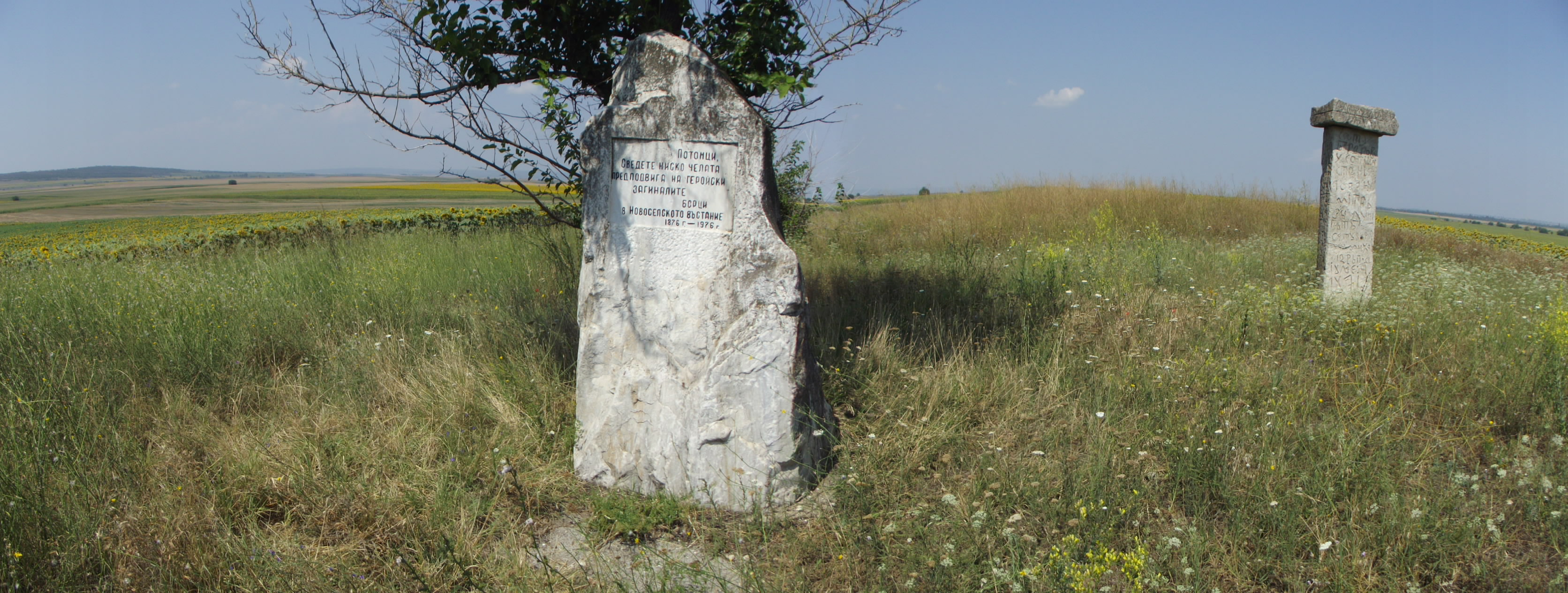 Оброчен кръст и паметна плоча в чест на загиналите новоселяни в Новоселското въстание от 1876 г.